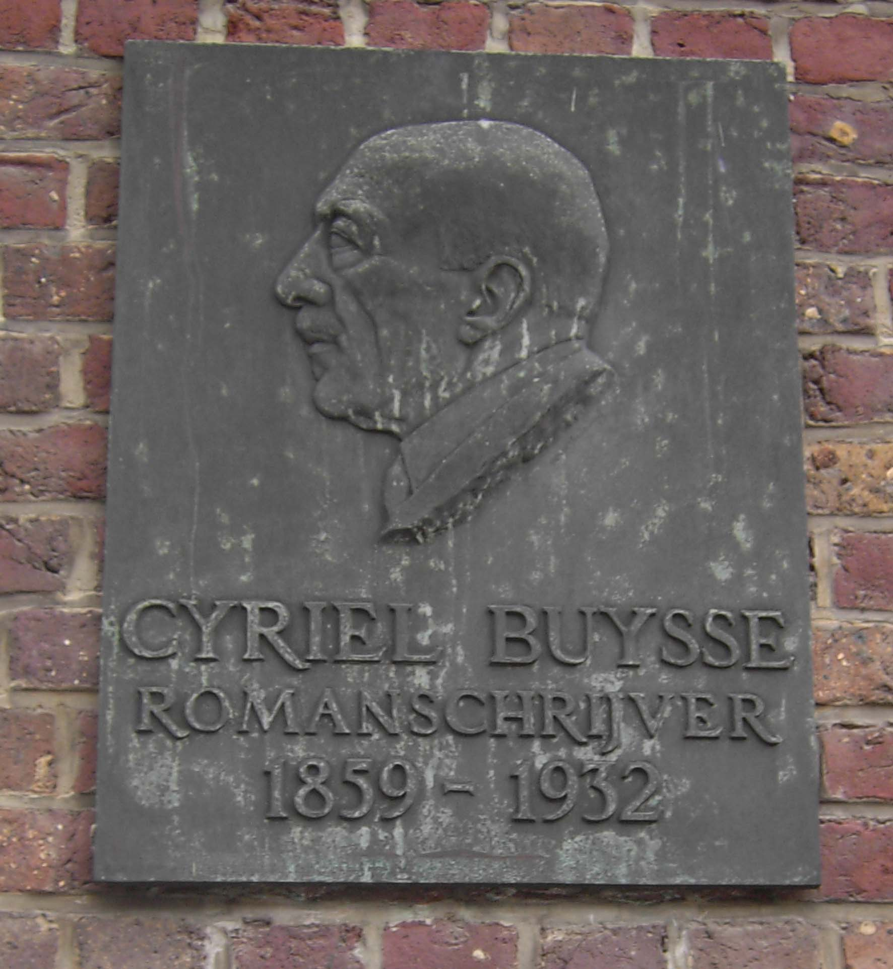 Gedenkplaat van Cyriel Buysse, schrijver - Nevele - Deinze - Oost-Vlaanderen - België.